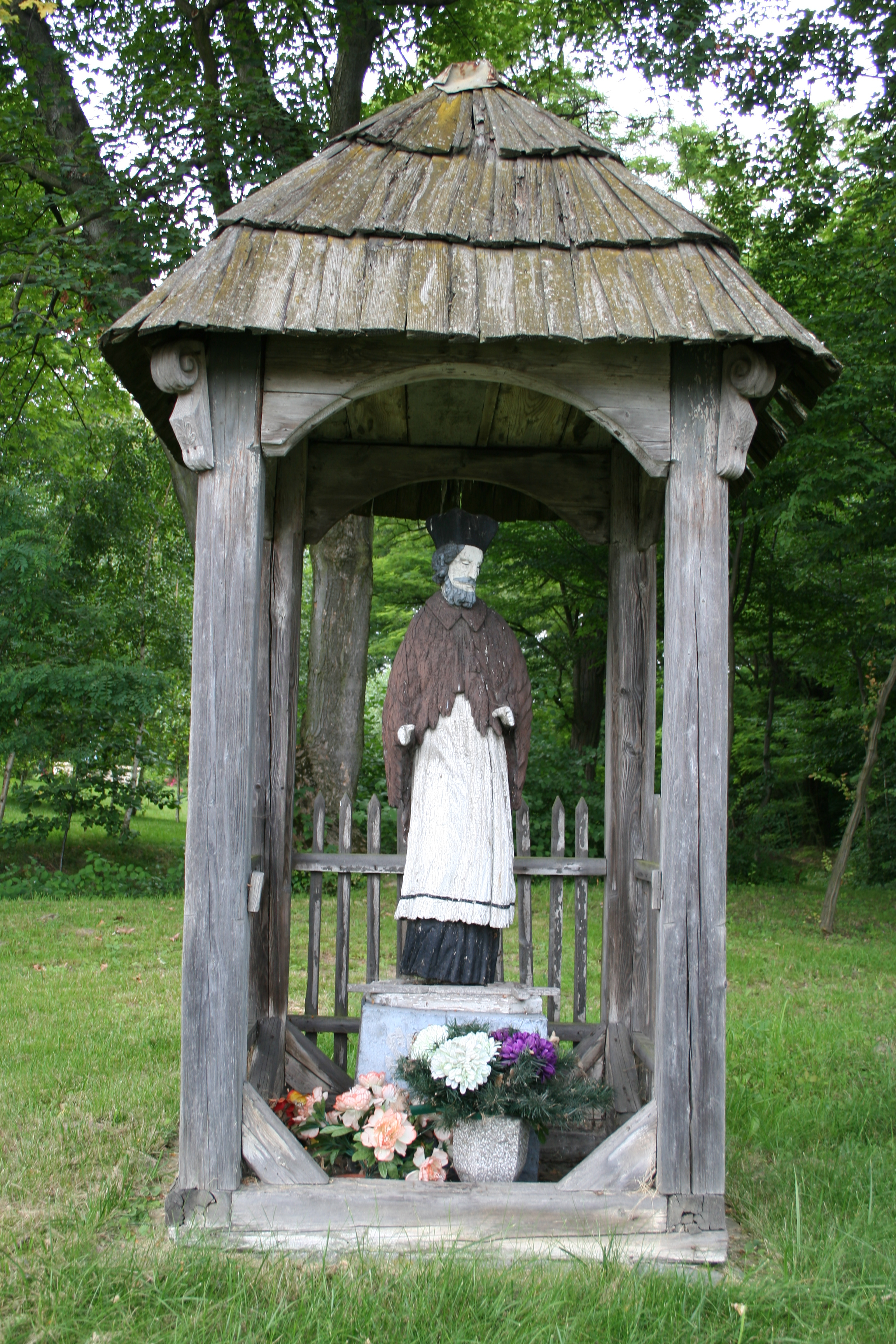 Nowa Wieś, kapliczka z figurą św. Jana Nepomucena, 2 poł. XIX